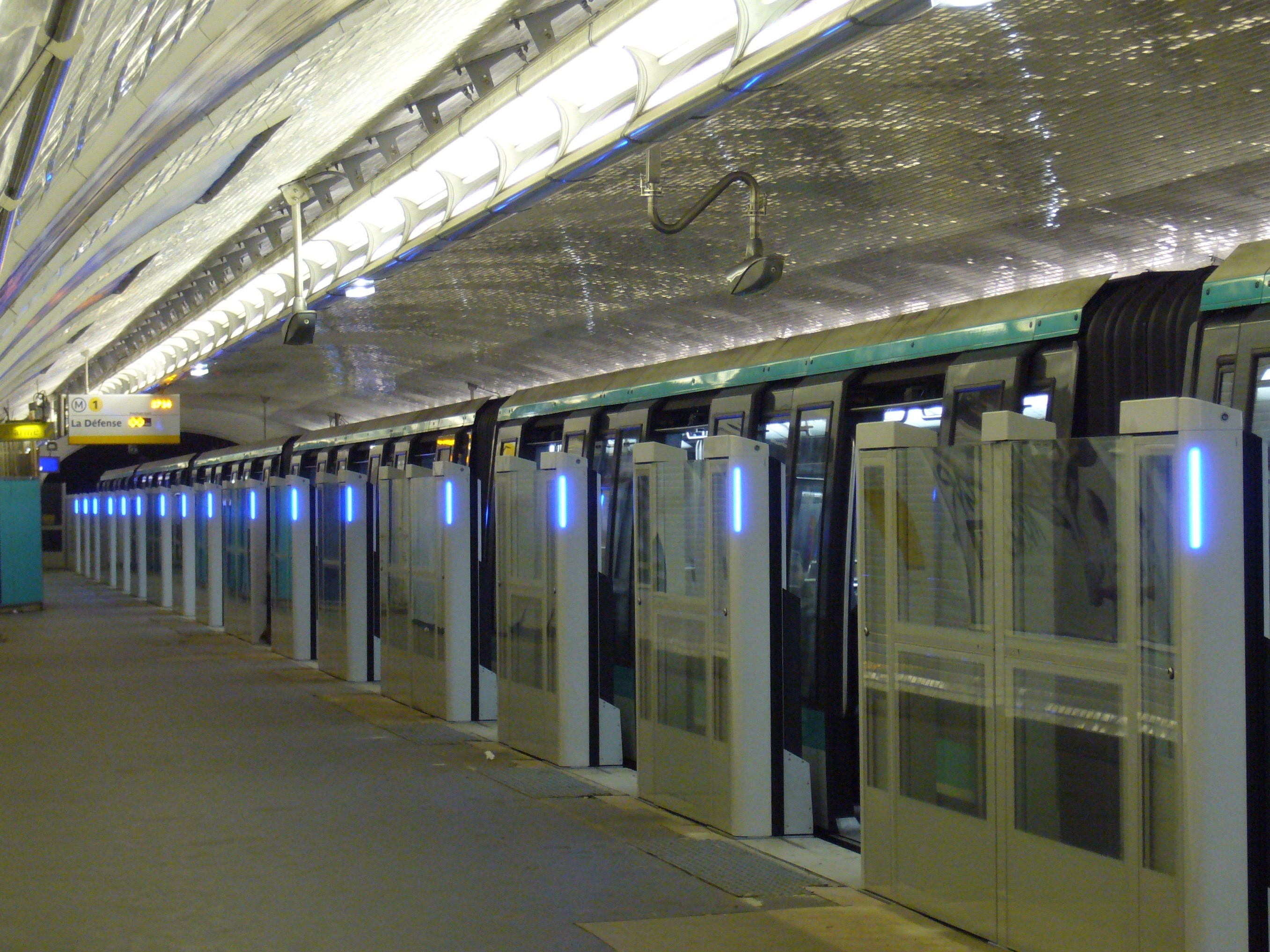 Instalace dveří, zabraňujících pádu cestujících do kolejiště ve stanici pařížského metra Berault na lince 1. Podobné dveře se používají většinou u linek metra, kde jsou v provozu automatizované vlaky bez strojvedoucích ovládané přímo z dispečinku